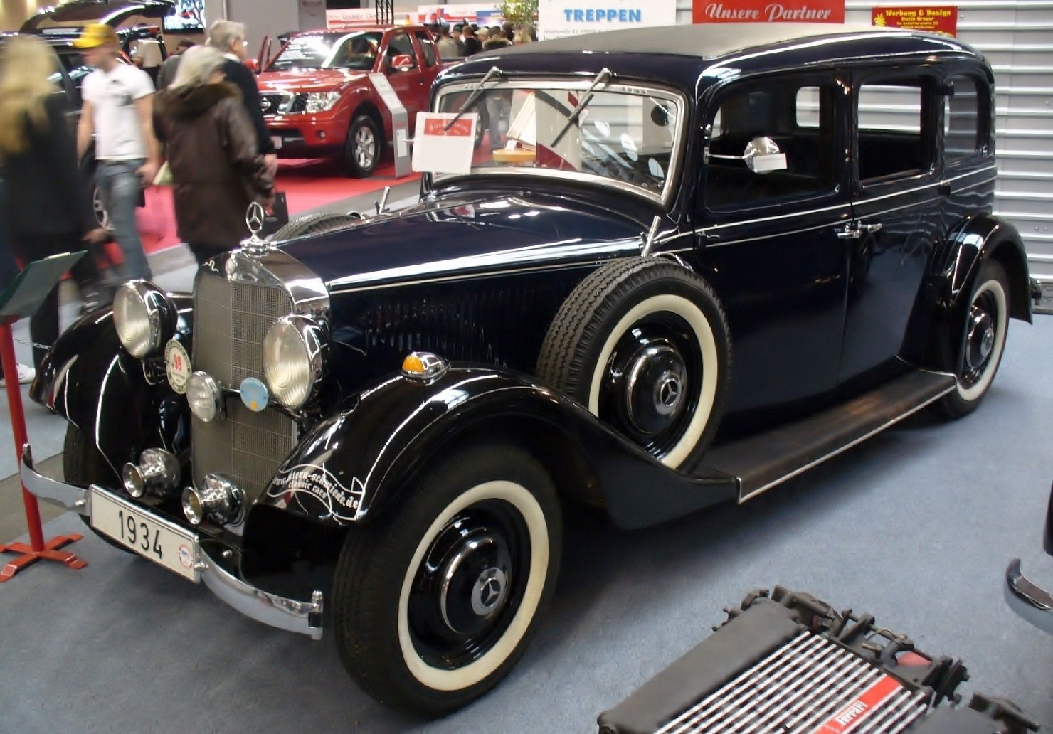 Mercedes-Benz 200 Pullmann